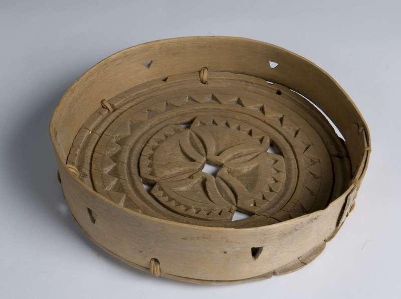 Samisk osteform fra 1800-årene fra Karasjok, Finnmark. Foto Anne-Lise Reinsfelt / Norsk Folkemuseum, NGSA.0446.